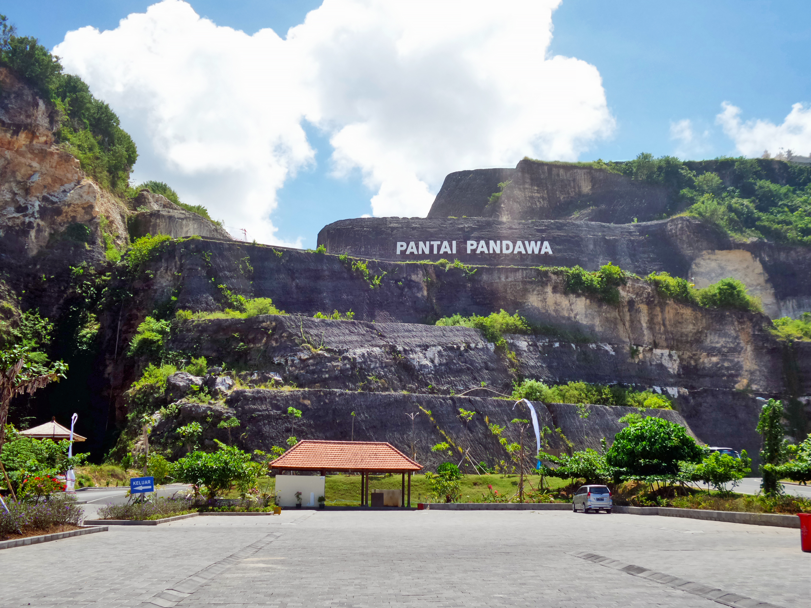 Tebing Pantai Pandawa